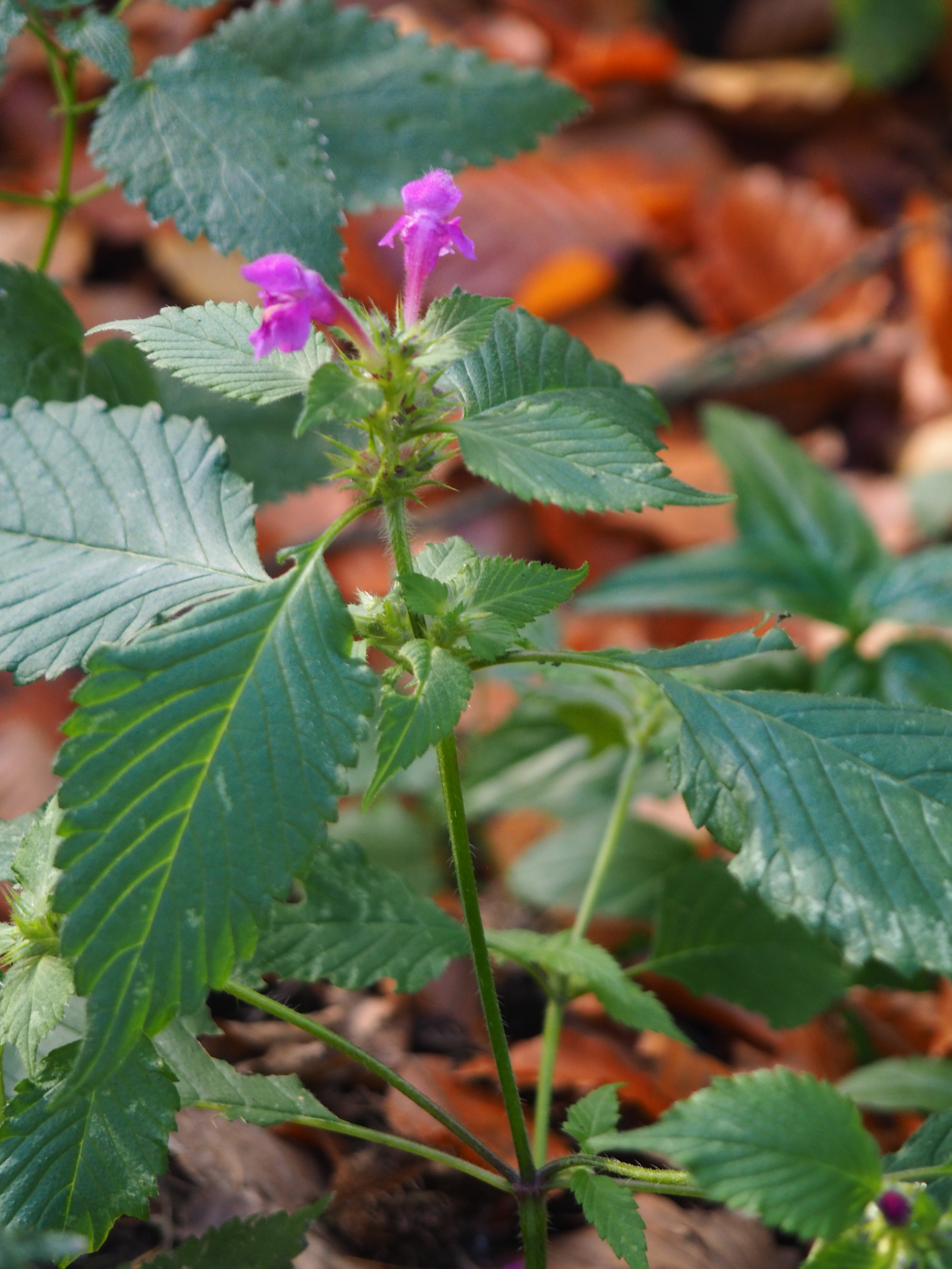 bylinnyý porost, konopice pýřitá.